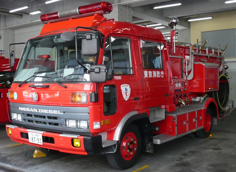 Nissan Diesel Condor fire engine. 京橋消防署の庁舎開放イベント消防わくわくパークにて撮影。